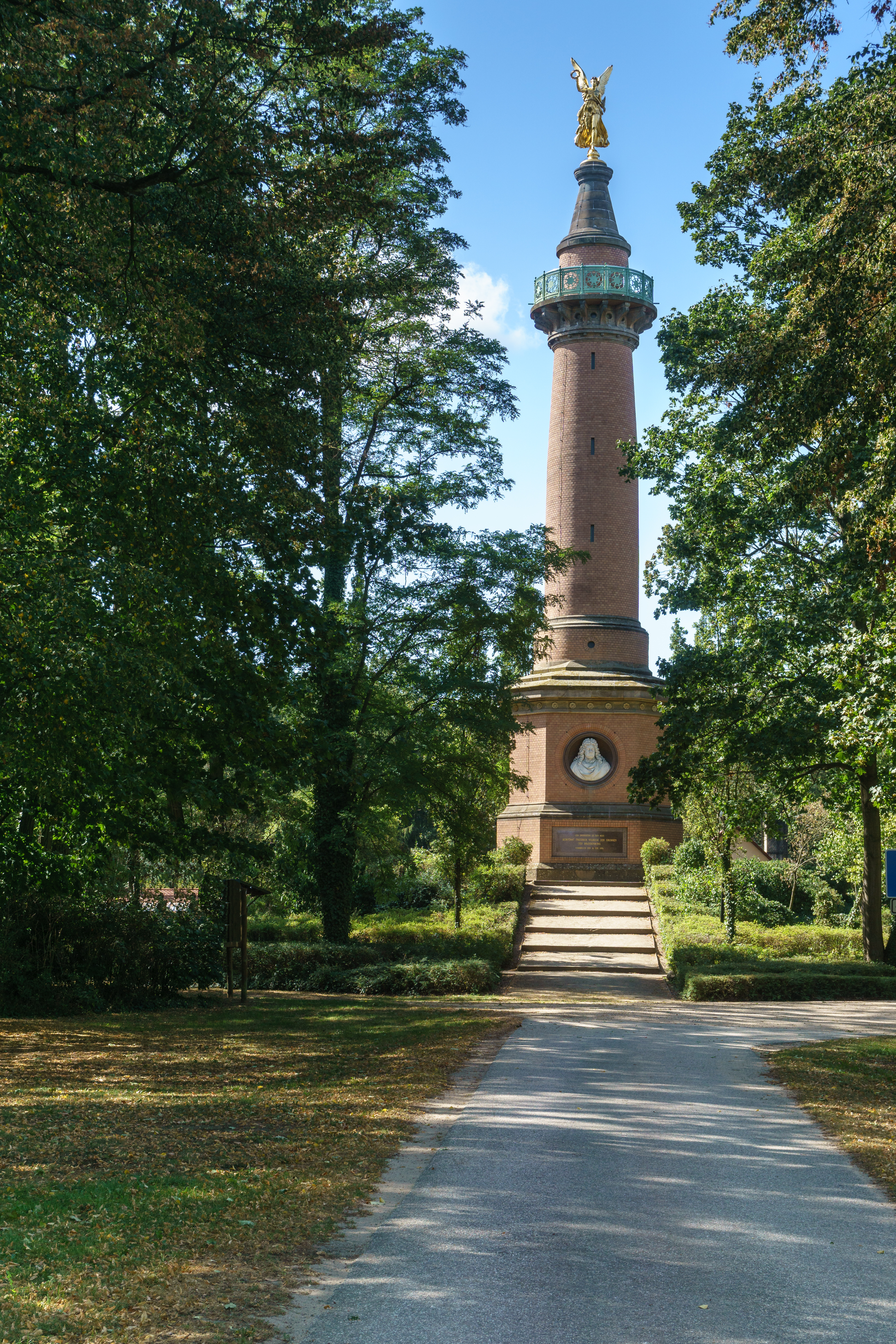 Denkmal für die Schlacht bei Fehrbellin 1675 (Neues Denkmal, Siegessäule von 1875/79), in Fehrbellin OT Hakenberg